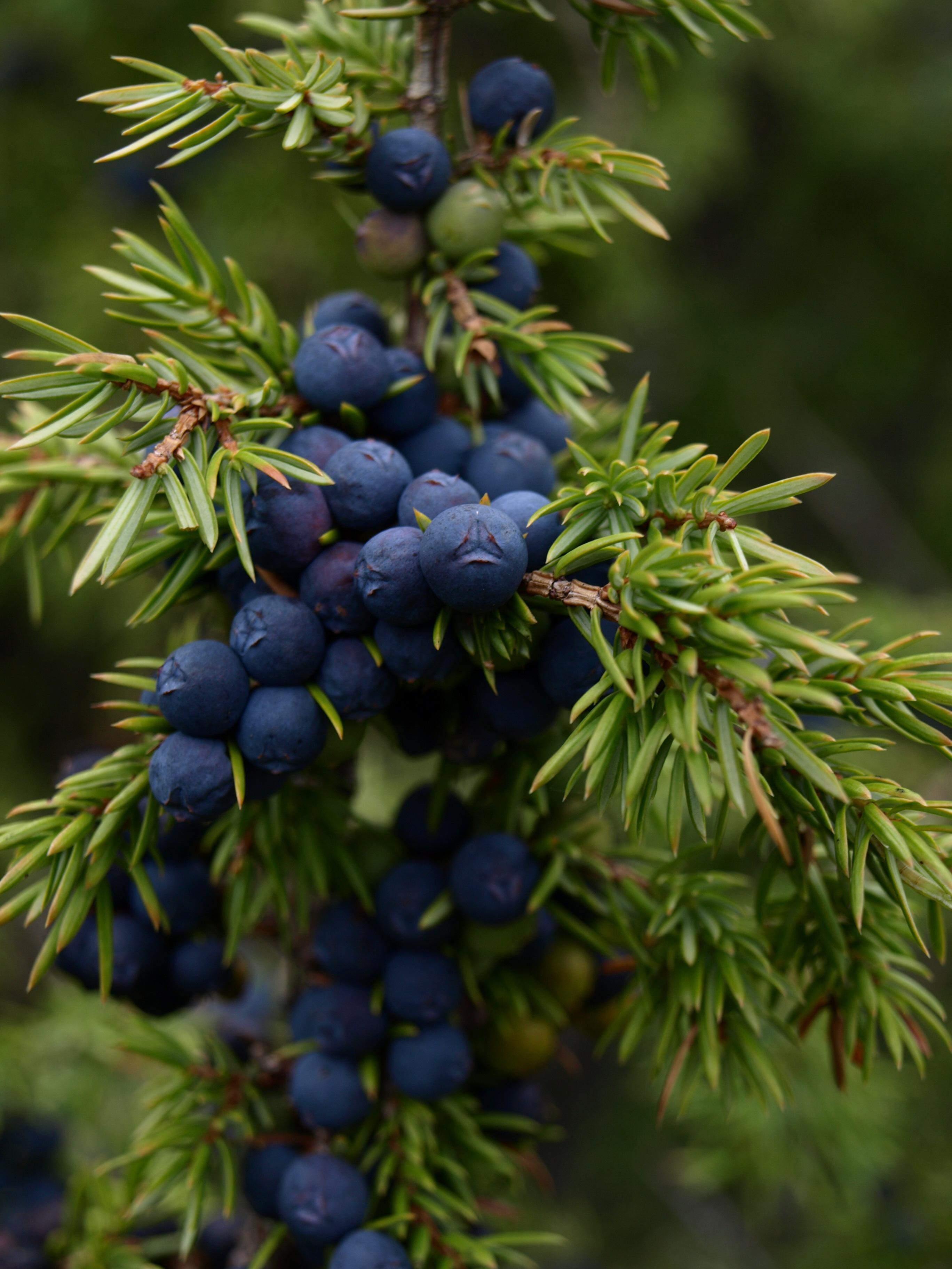 Harilik kadakas